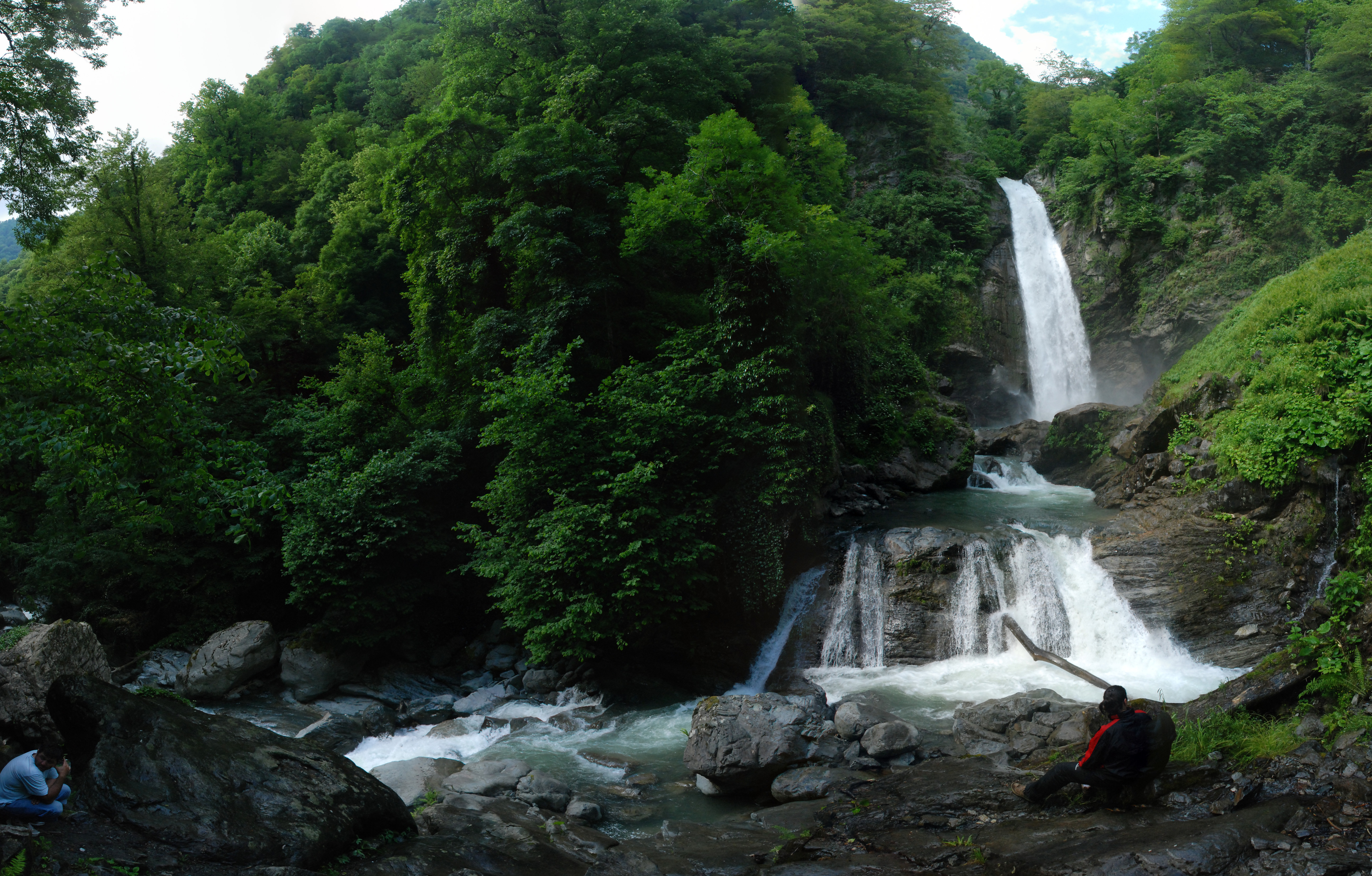 Lagodekhi - Waterfall panoramic view